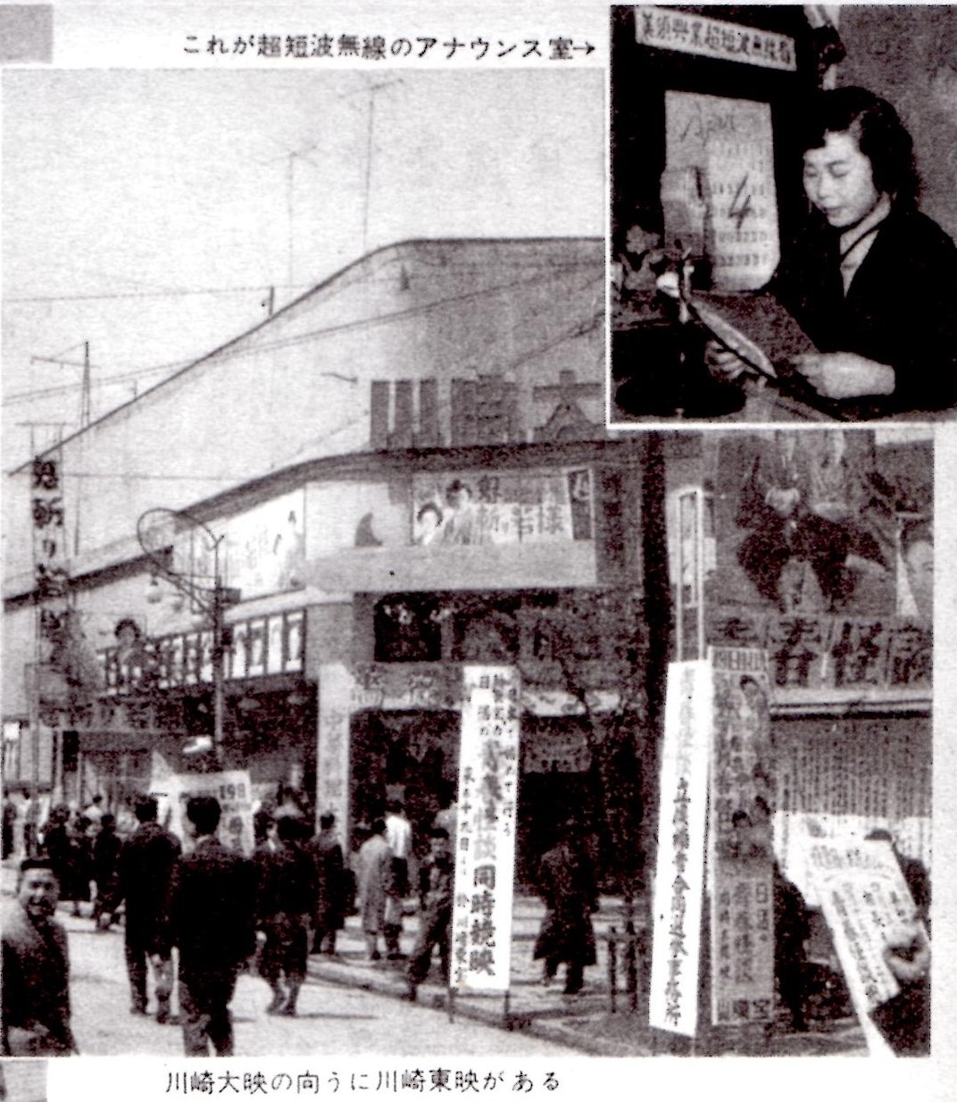 神奈川県川崎市の映画館「川崎大映」。